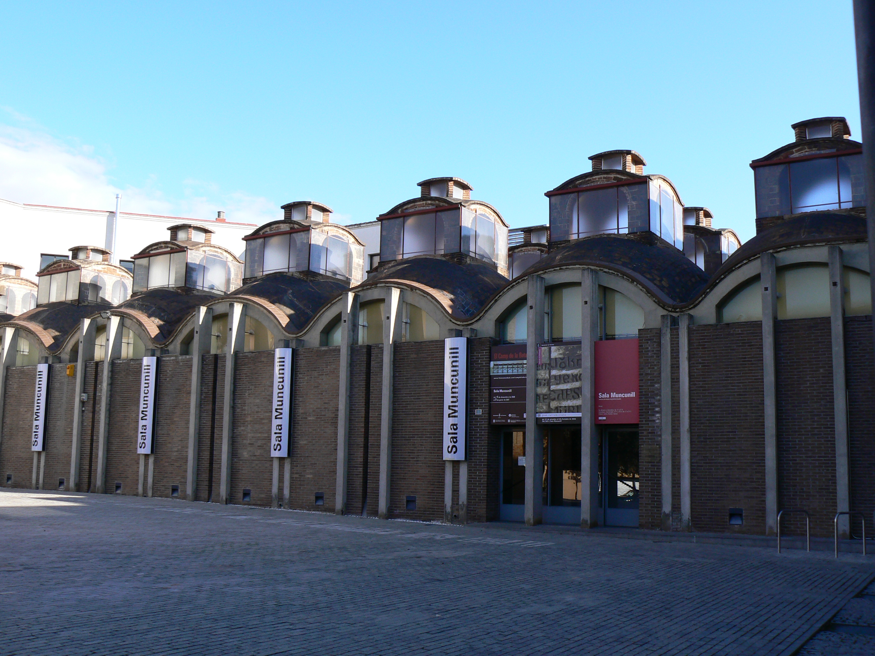 Sala Muncunill, antiga i espectacular nau de tints d'un vapor de Lluís Muncunill (1917) avui utilitzada com a sala d'exposicions. Old vapor of 1917 today used as a Exhibitions House.